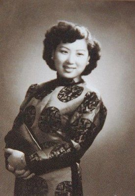 吴莺音1940年宣传照片